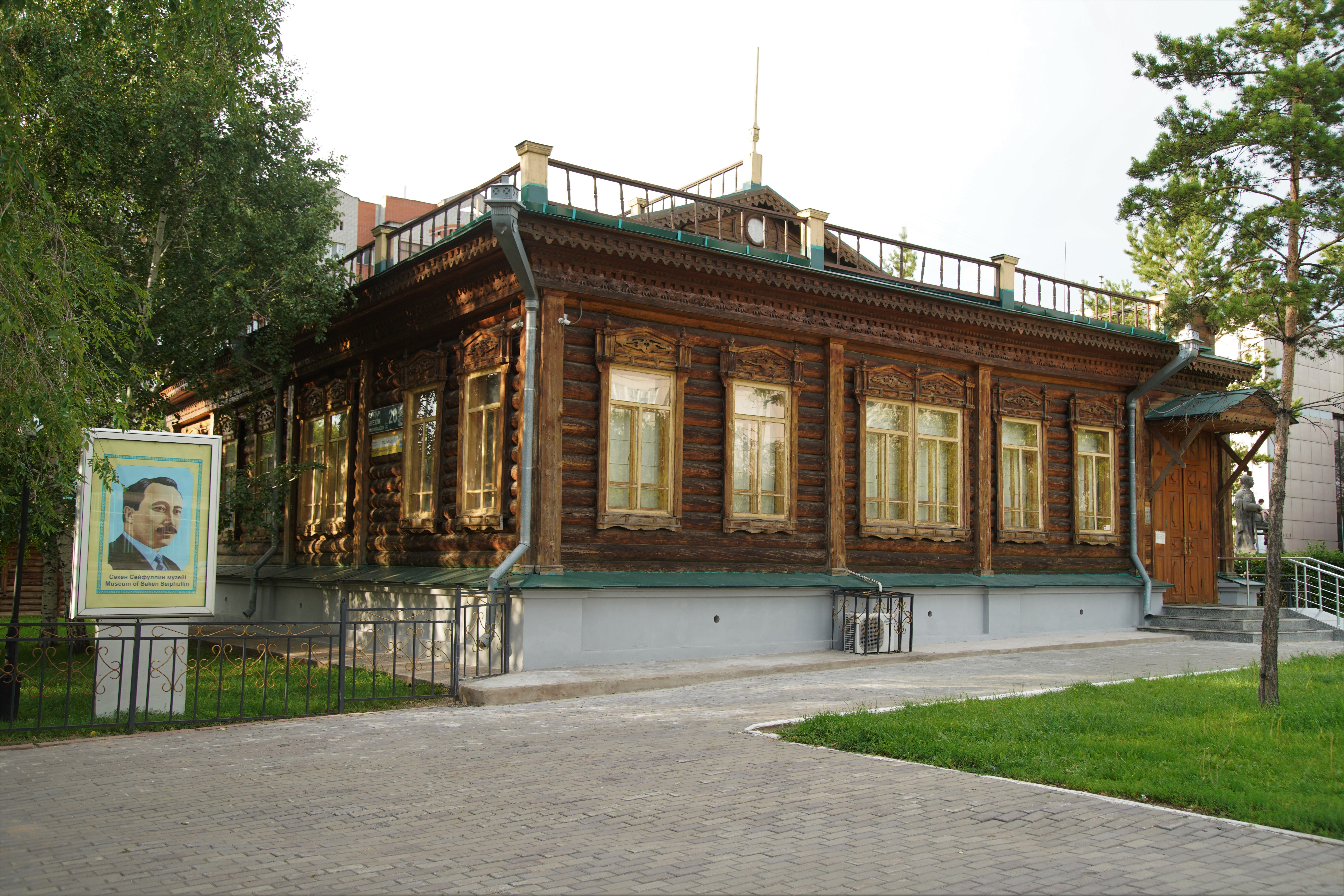 Музей Сакена Сейфуллина